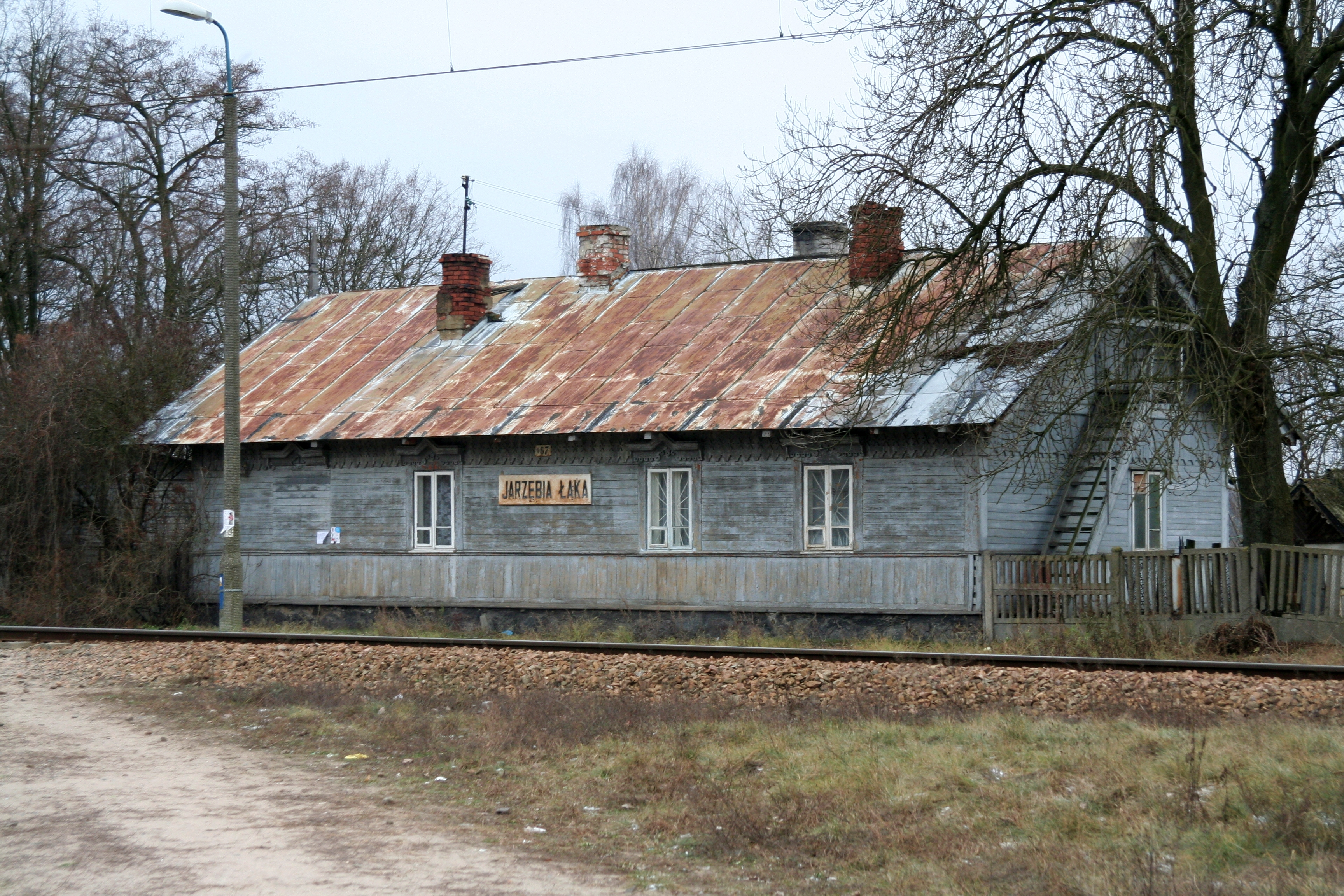 Przystanek osobowy Jarzębia Łąka / Railway Station Jarzębia Łąka